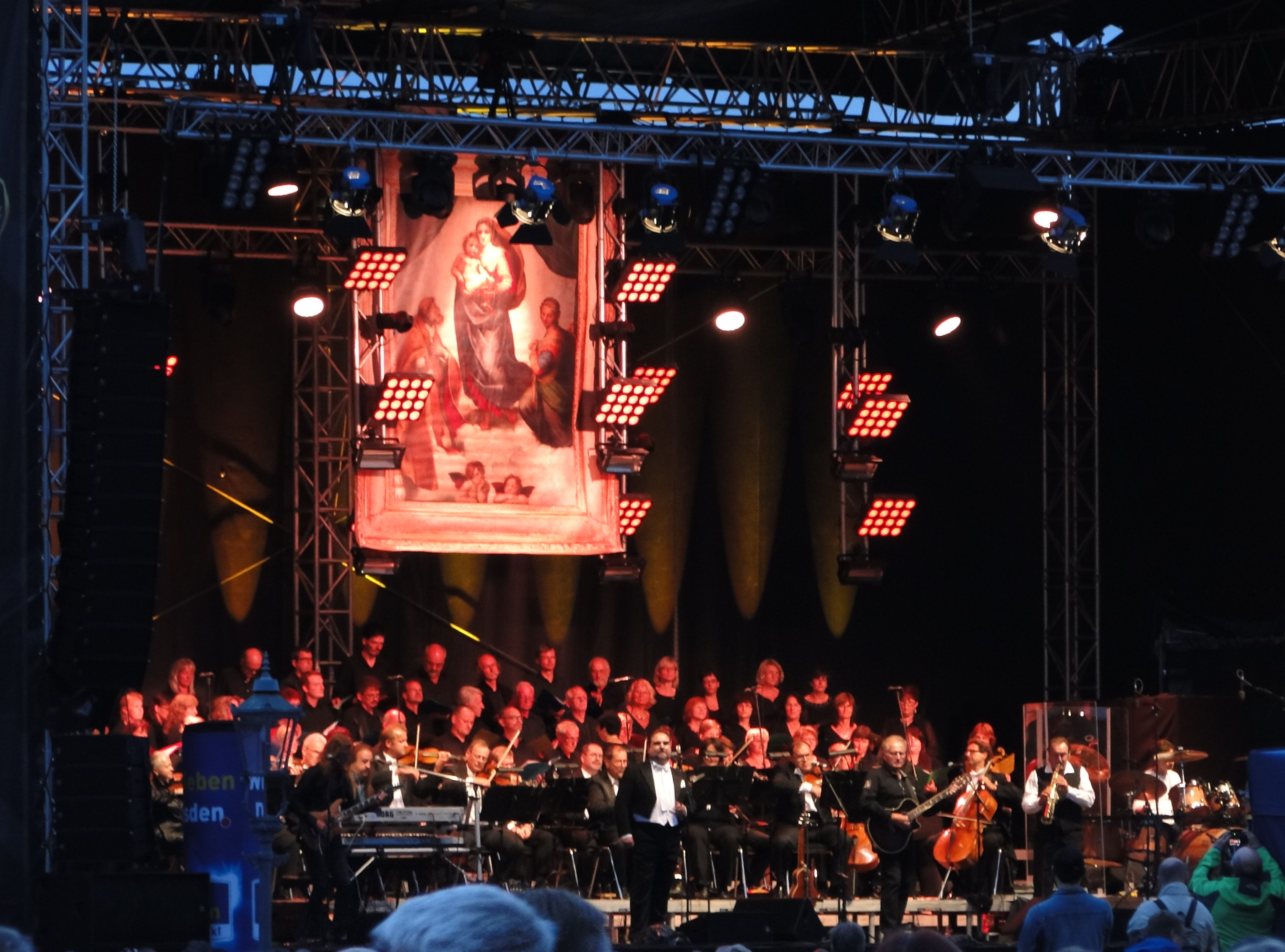 Die Band electra bei der Open-Air-Aufführung des Stücks "Die Sixtinische Madonna" im Rahmen des Dresdner Stadtfests 2014